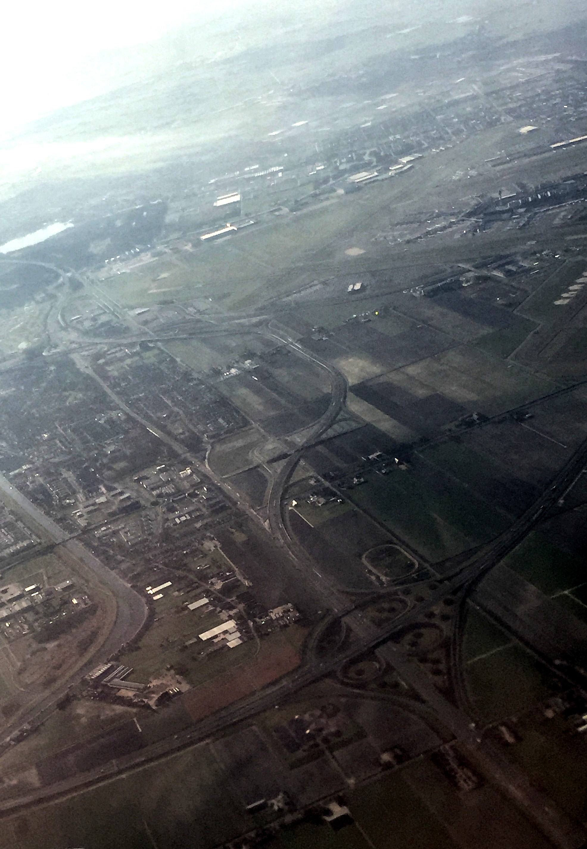 De omlegging van de A9 bij Badhoevedorp. Rechtsonderaan knooppunt Raasdorp, in het verschiet knooppunt Badhoevedorp. Rechts de luchthaven Schiphol